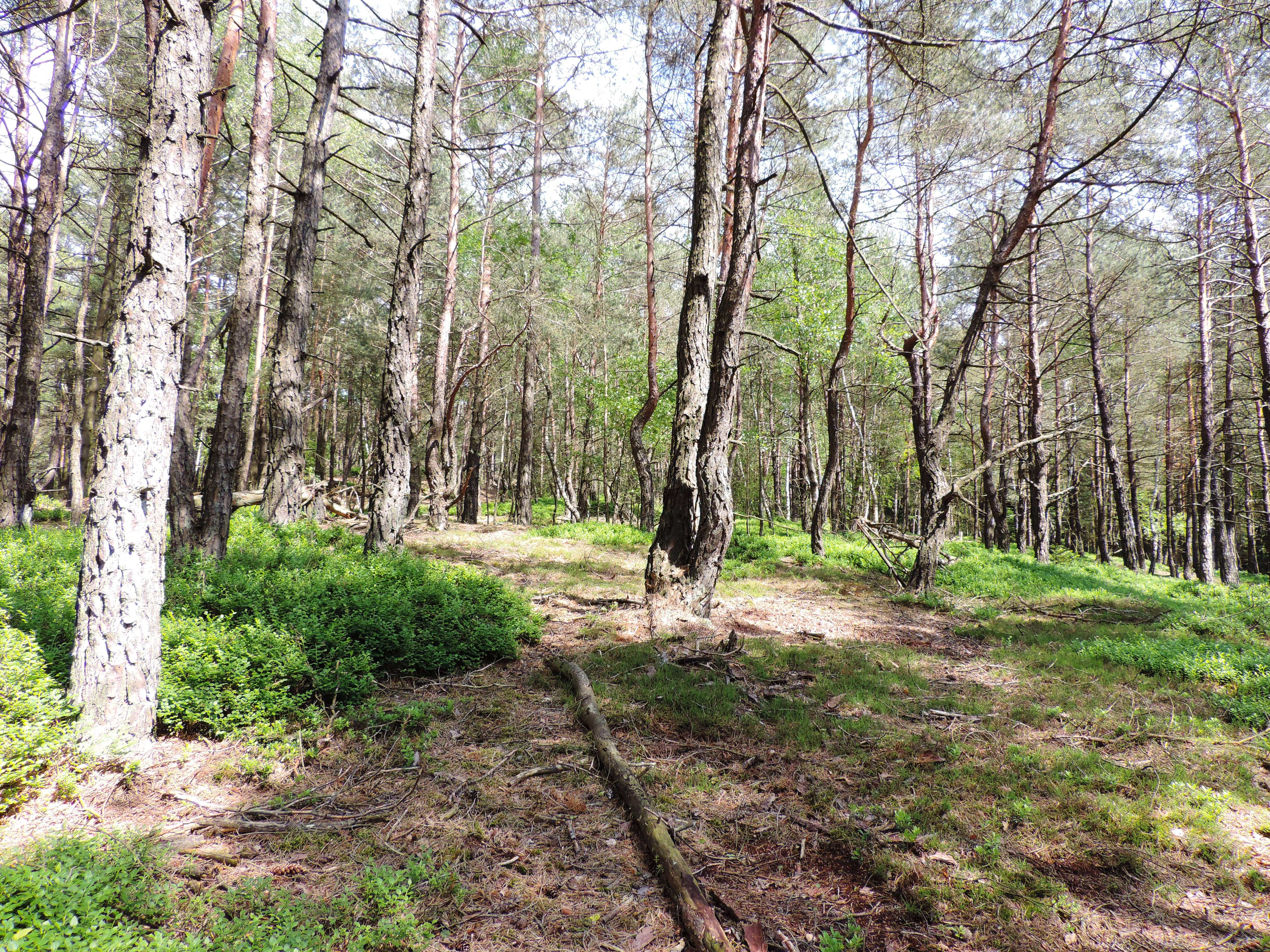 zeigt einen Blick auf den Forchenhügel mit der typischen Heidelbeer-Kiefernwald Vegetation